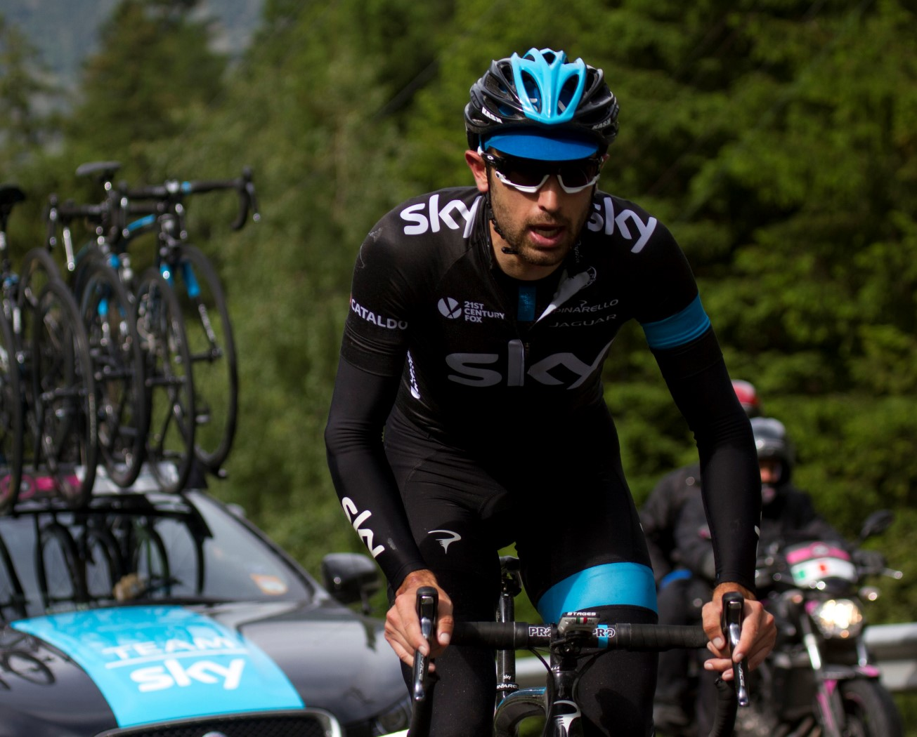 022 cataldo